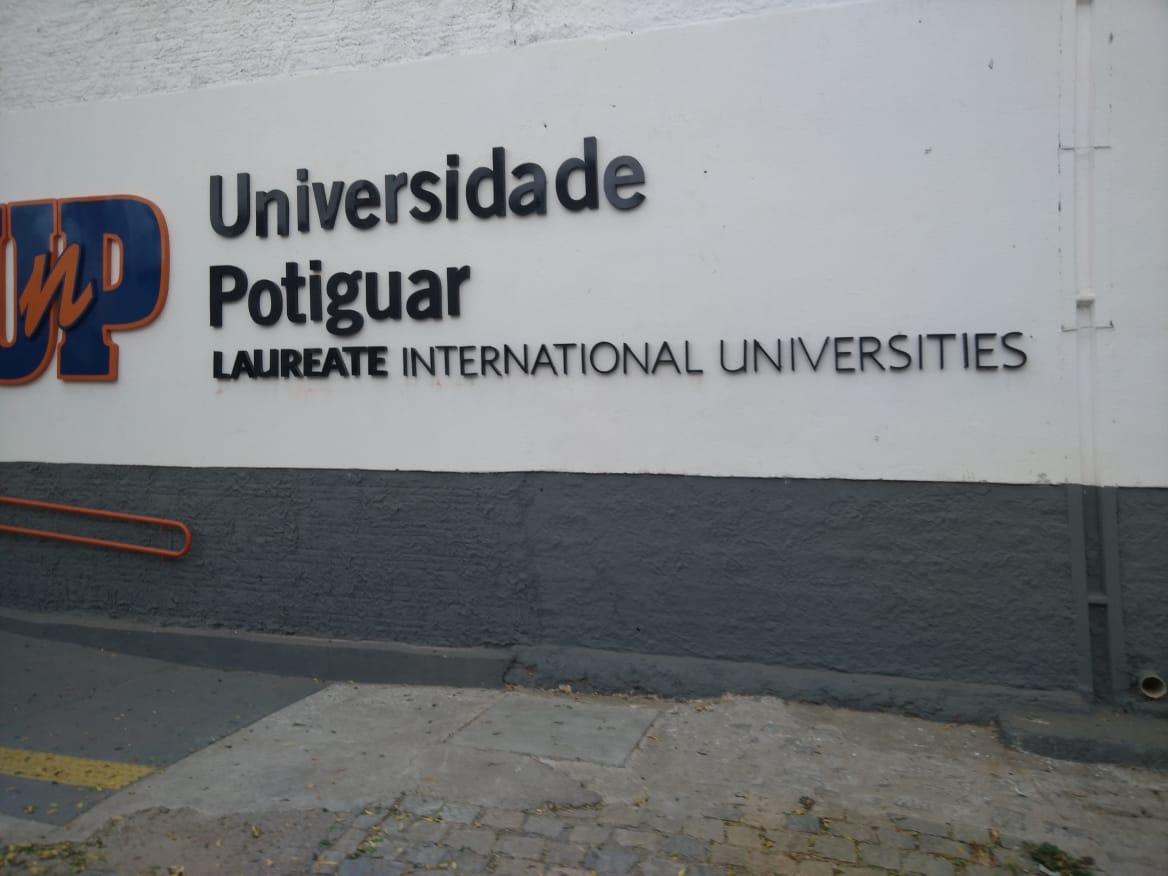 Sede da Universidade Potiguar (UnP) de Caicó/RN.